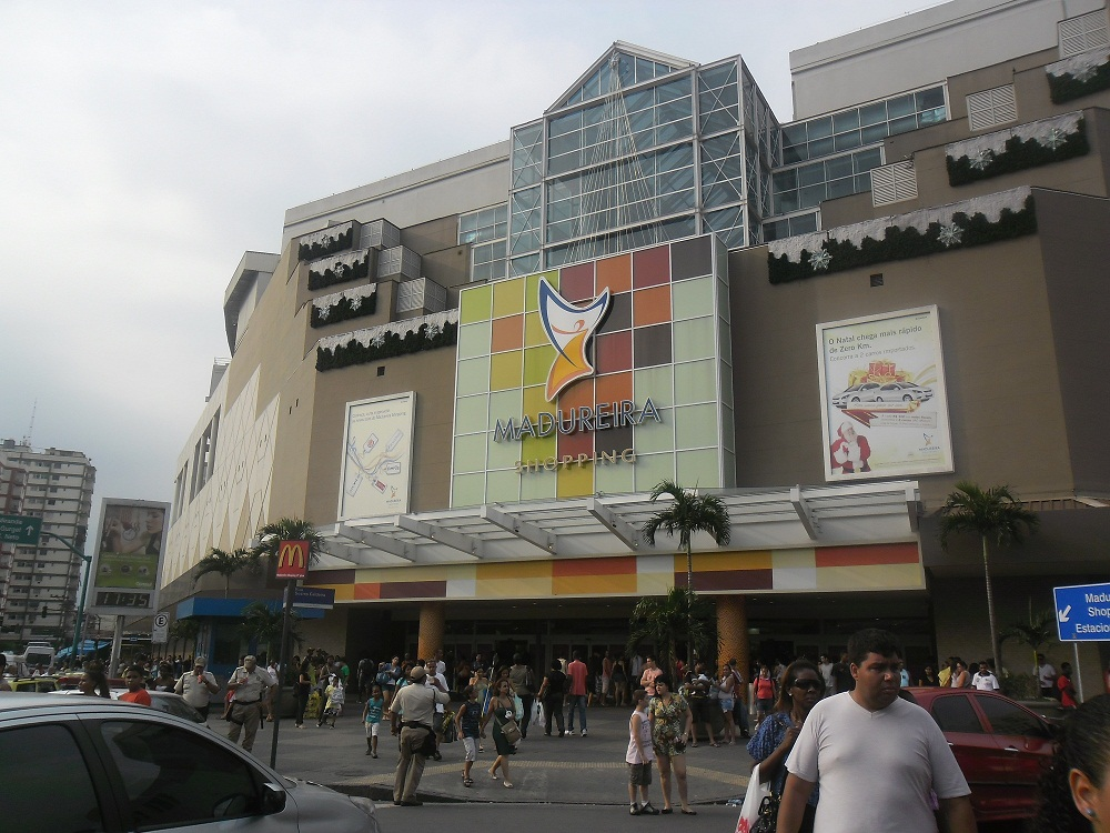 Fachada do Madureira Shopping, na antevéspera do Natal de 2012.